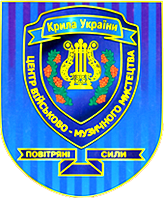 Нарукавний знак, Центр військового музичного мистецтва Повітряних сил Збройних сил України